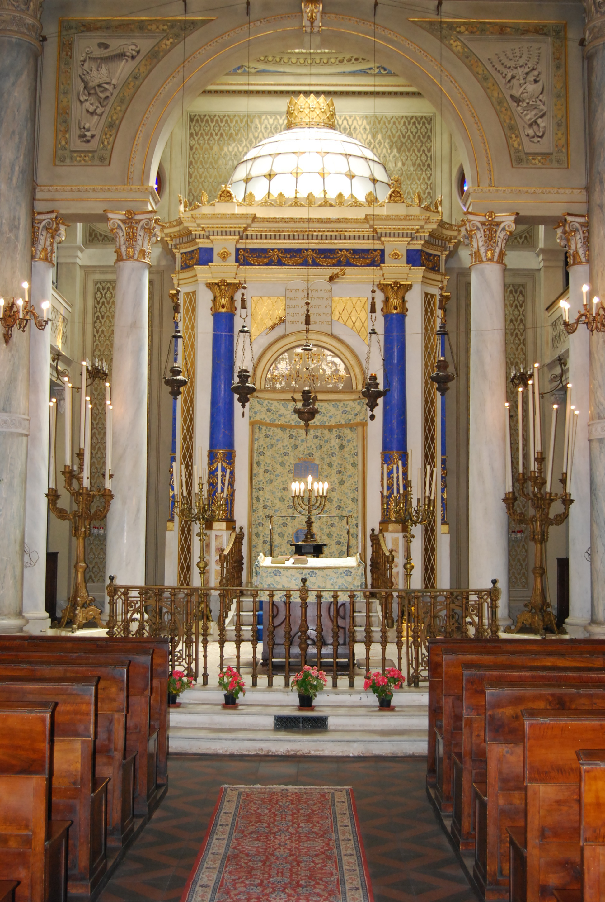 La Teva e l' Aron HaKodesh della Sinagoga di Modena